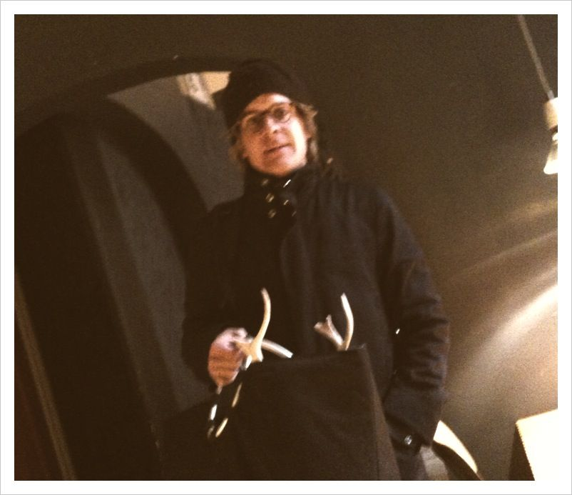 Dagen Axel blev chefredaktör. här med ett renhuvud i kassen.